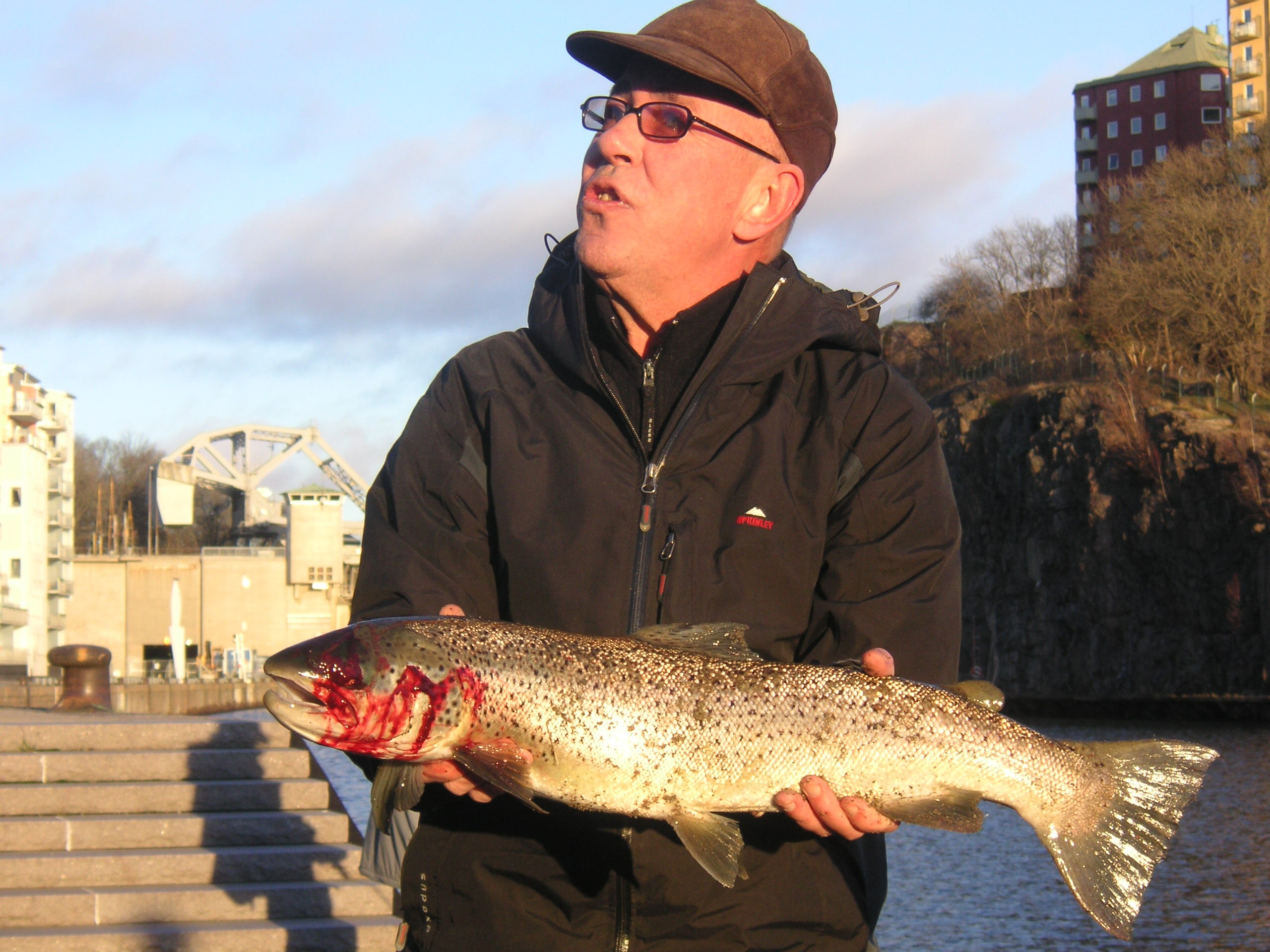 Nyfångad Havsöring i Hammarbykanalen i Stockholm